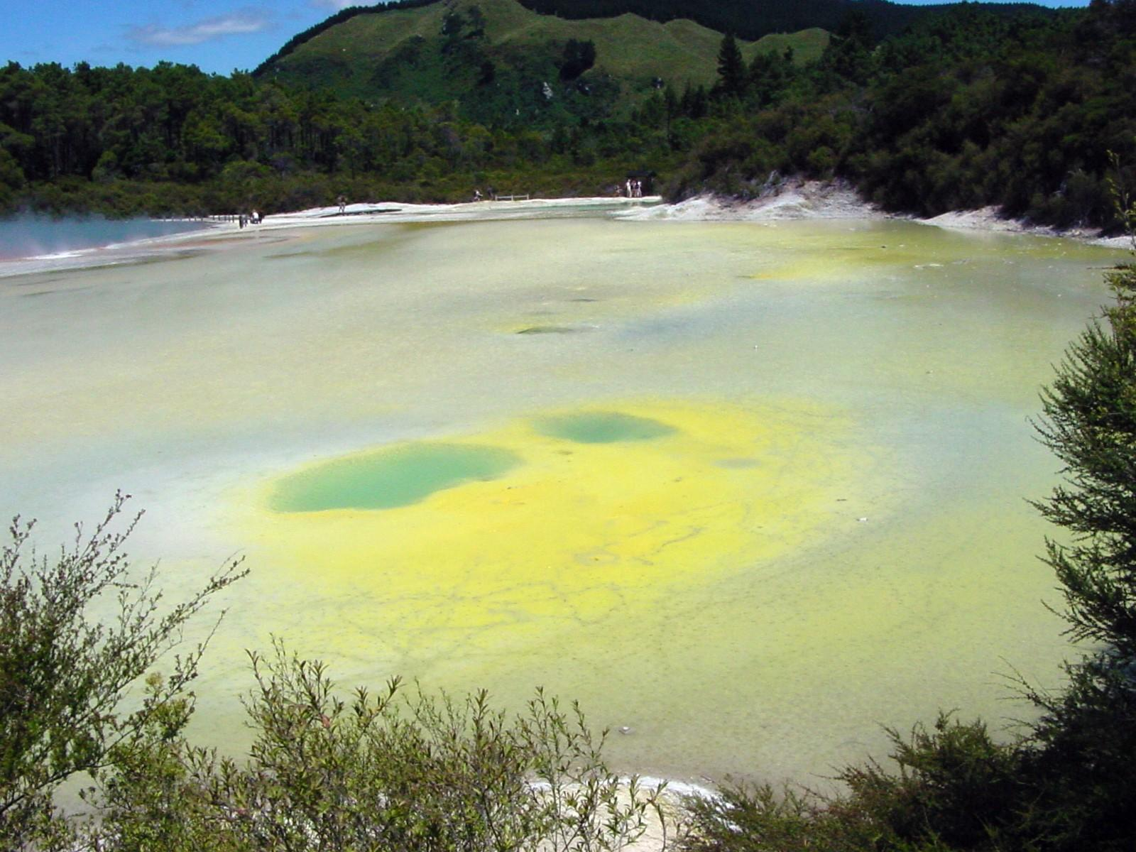 Artist's Palette, Wai-O-Tapu Thermal Wonderland, Neuseeland